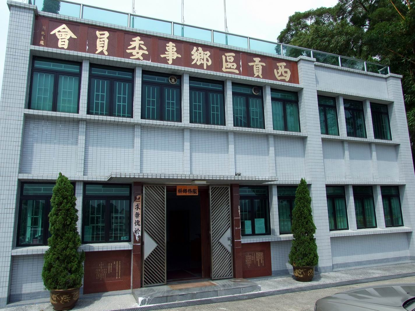 西貢區鄉事委員會